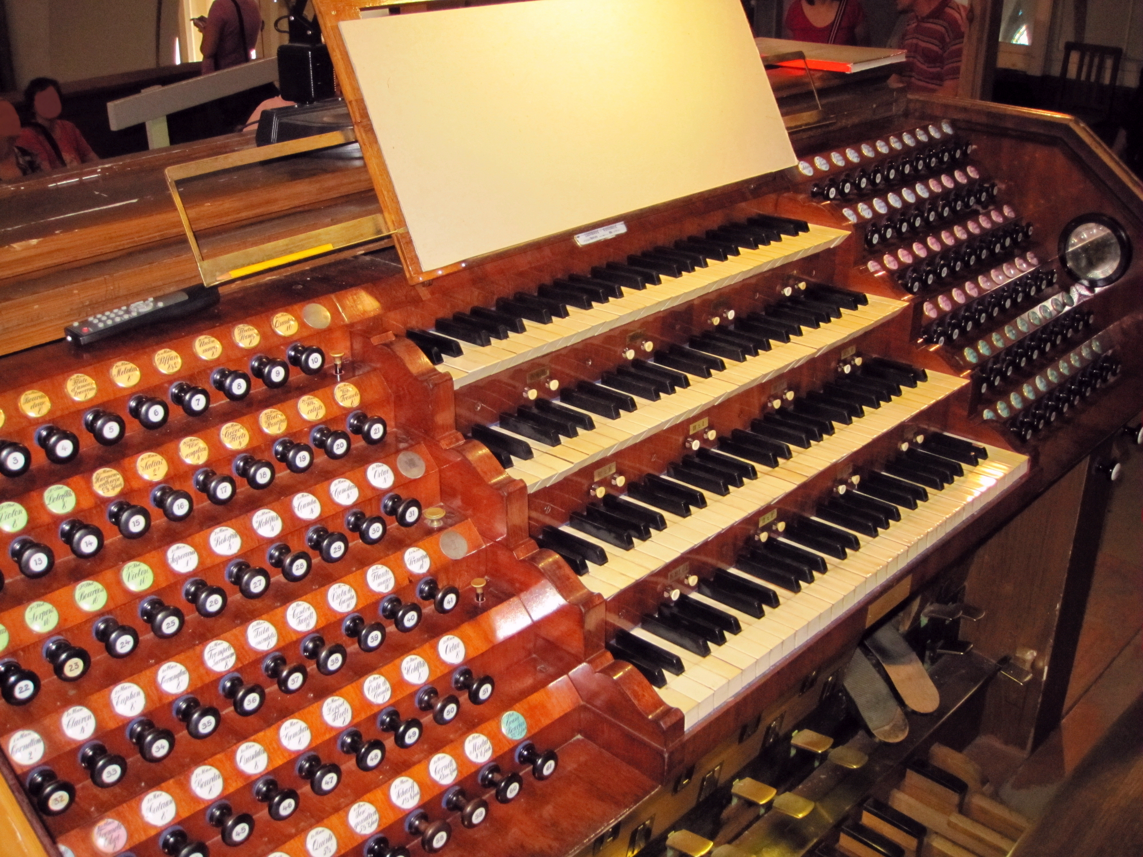 Spieltisch der Walkerorgel im Rigaer Dom